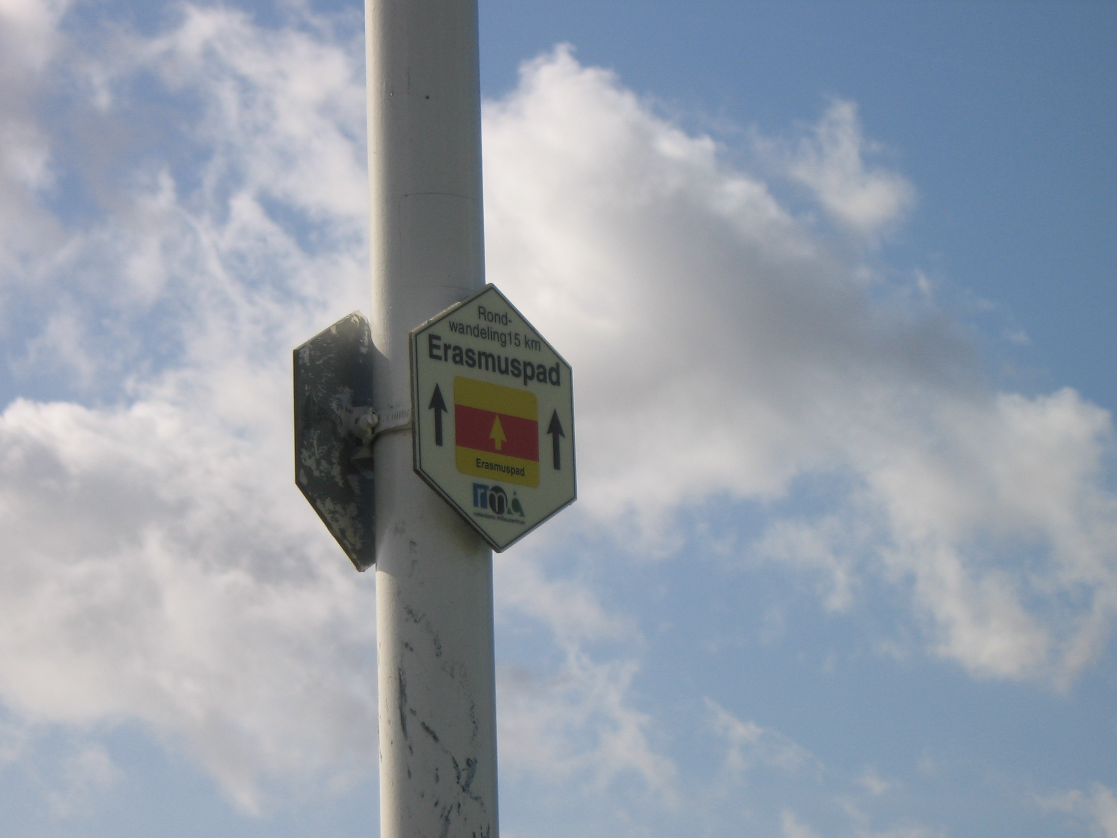 Bewegwijzering Erasmuspad